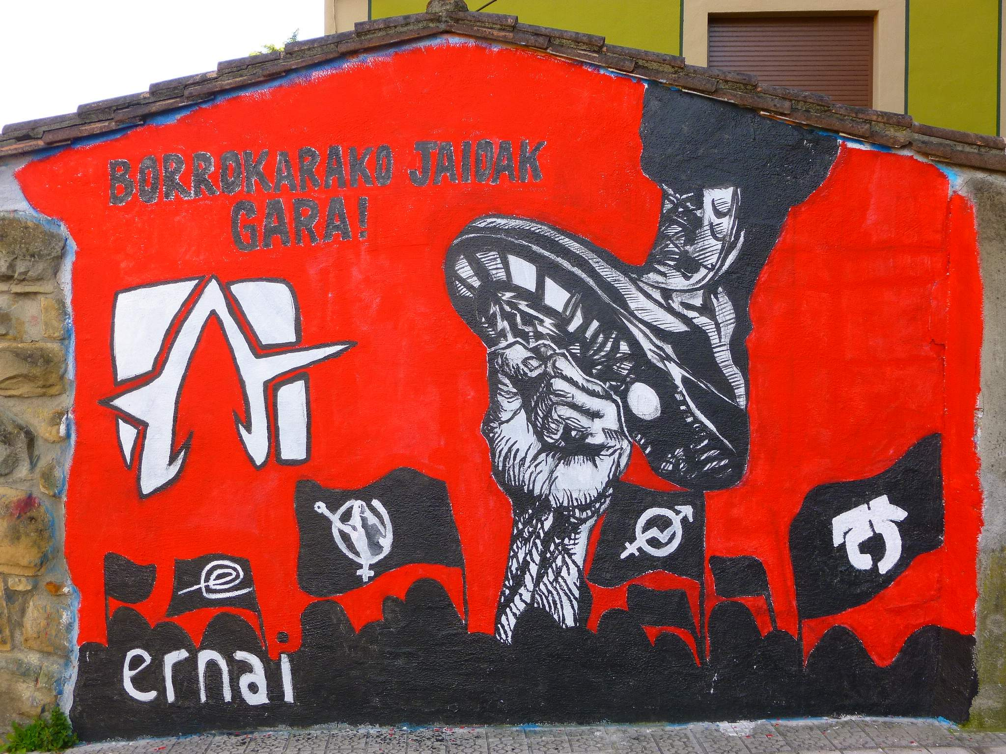 Abadiño (Bizkaia)